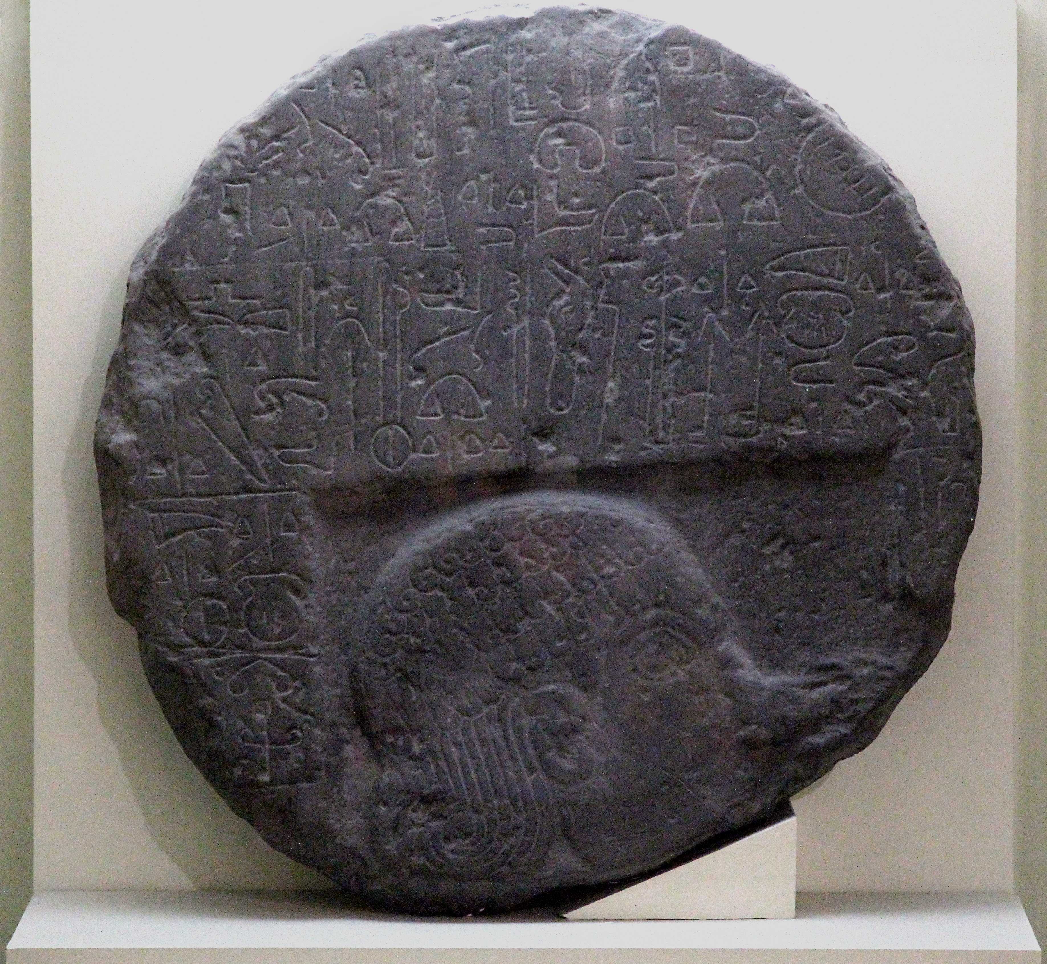 Späthethitisches Stelenfragment von Andaval, Gipsabdruck im Archäologischen Museum Niğde, Türkei, Original in Ankara